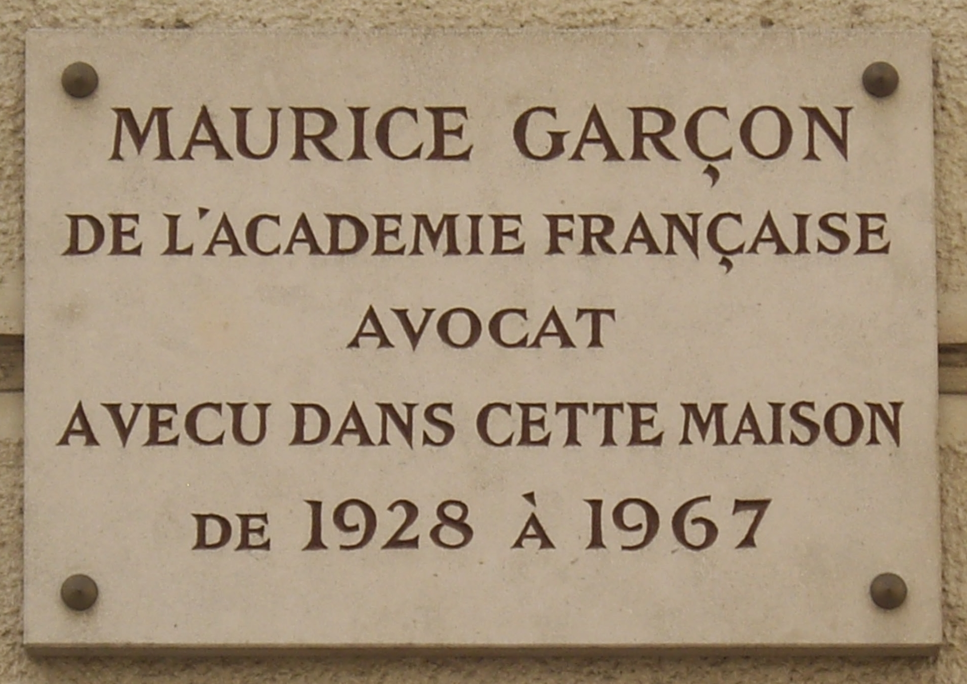 Plaque apposée au n° 10 de la rue de l'Éperon, Paris 6e, où vécut l'avocat Maurice Garçon (1889-1967) de 1928 à 1967.